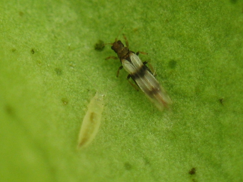 adulte Thysanoptera ("Thrips") und Nymphe auf einer Zitruspflanze